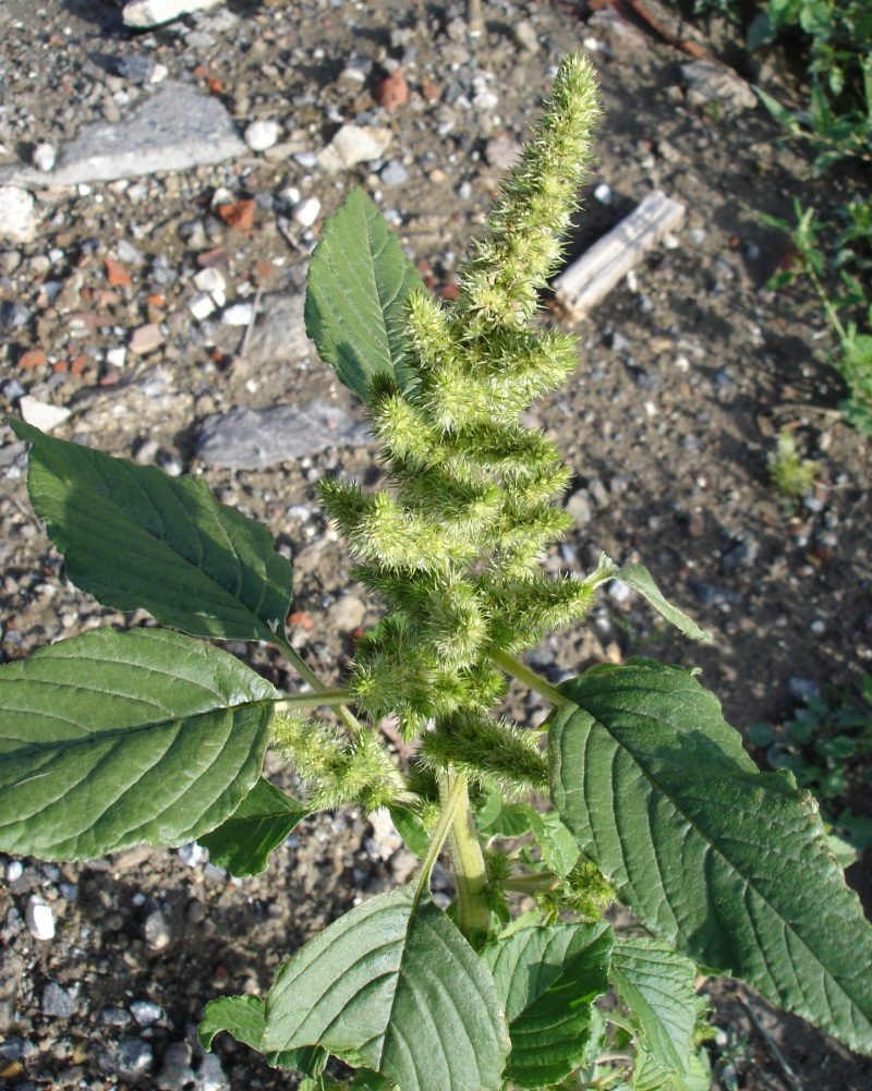 Amaranthus hybridus, photo prise à Mastaing (59)